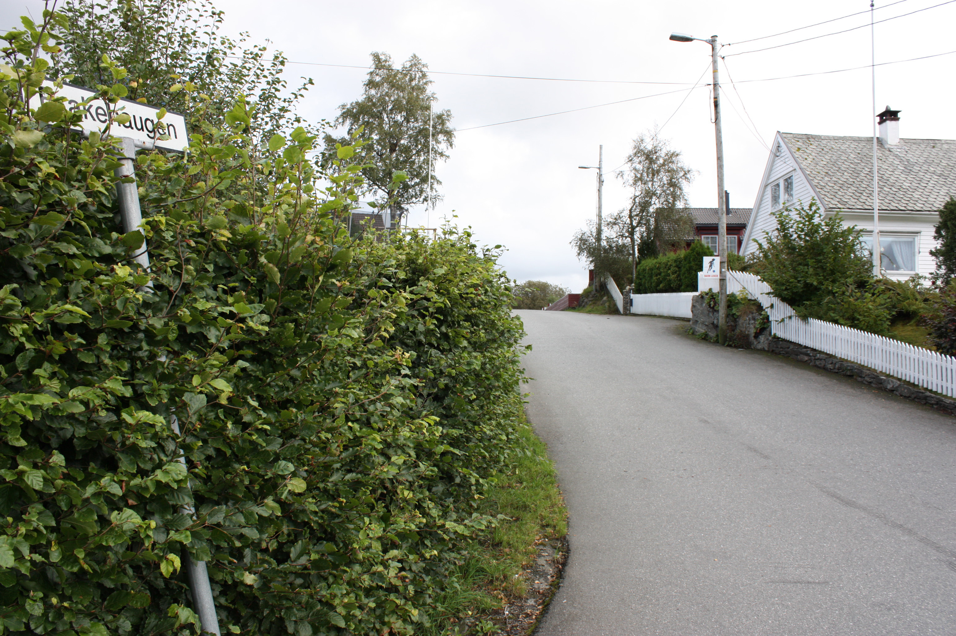 Brakehaugen, Fana, Bergen.